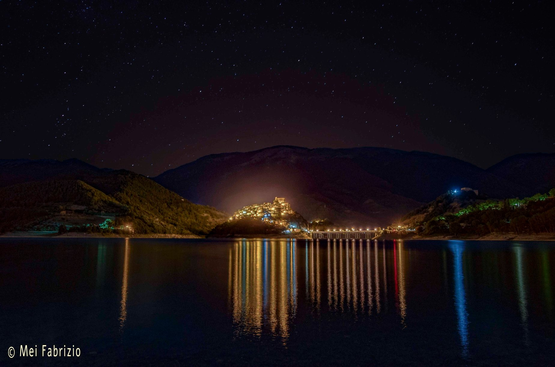 Castel di Tora da Colle di Tora - Lago del Turano